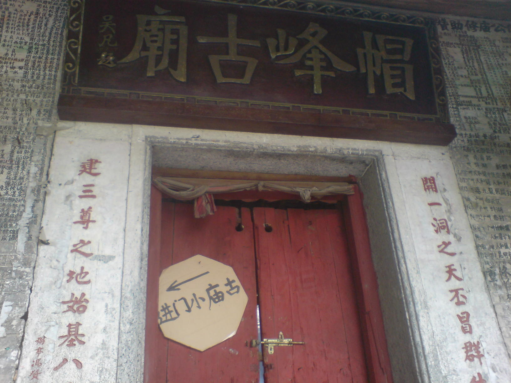 广州帽峰山的帽峰古庙